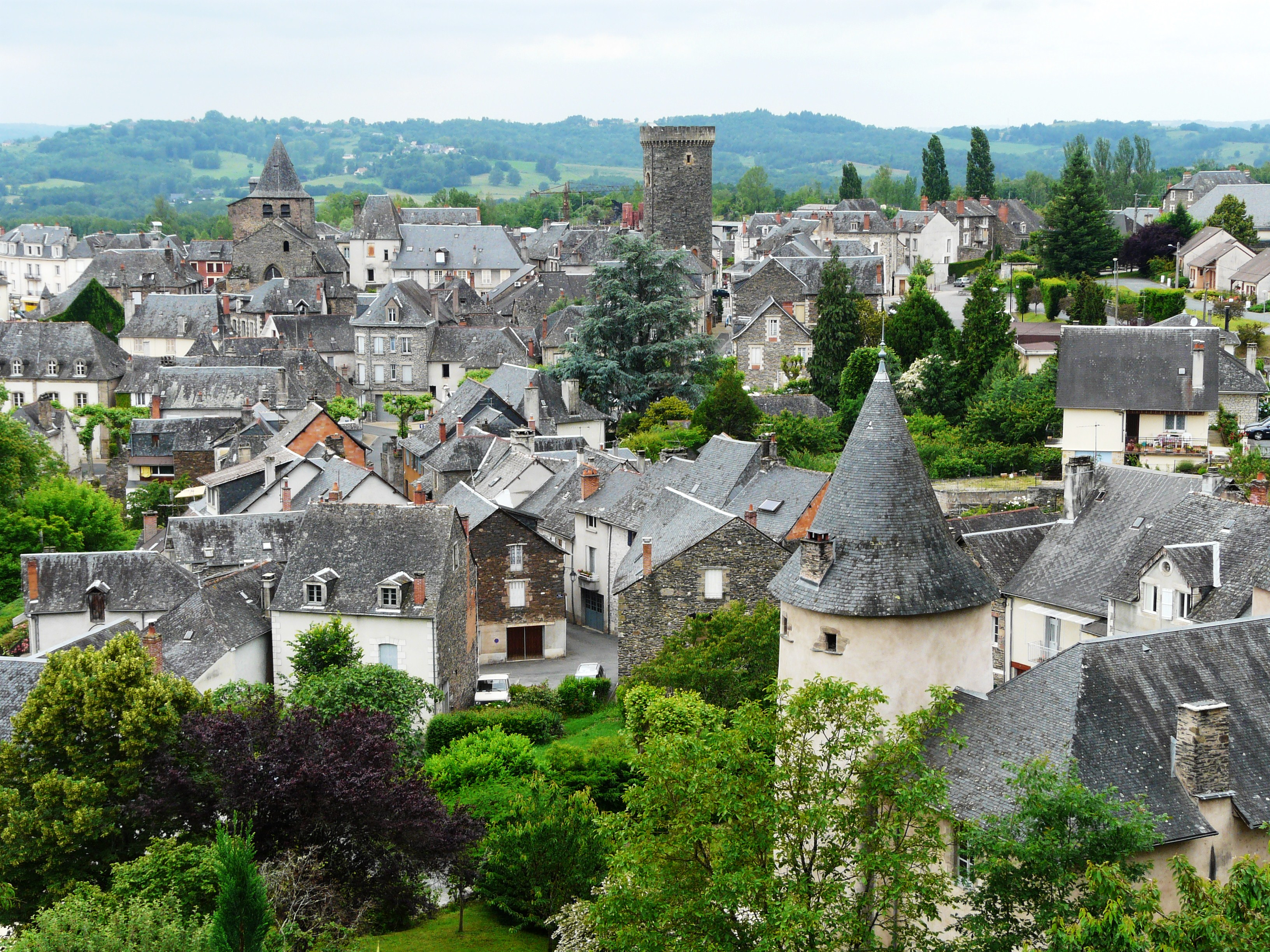 Vue générale d'Allassac